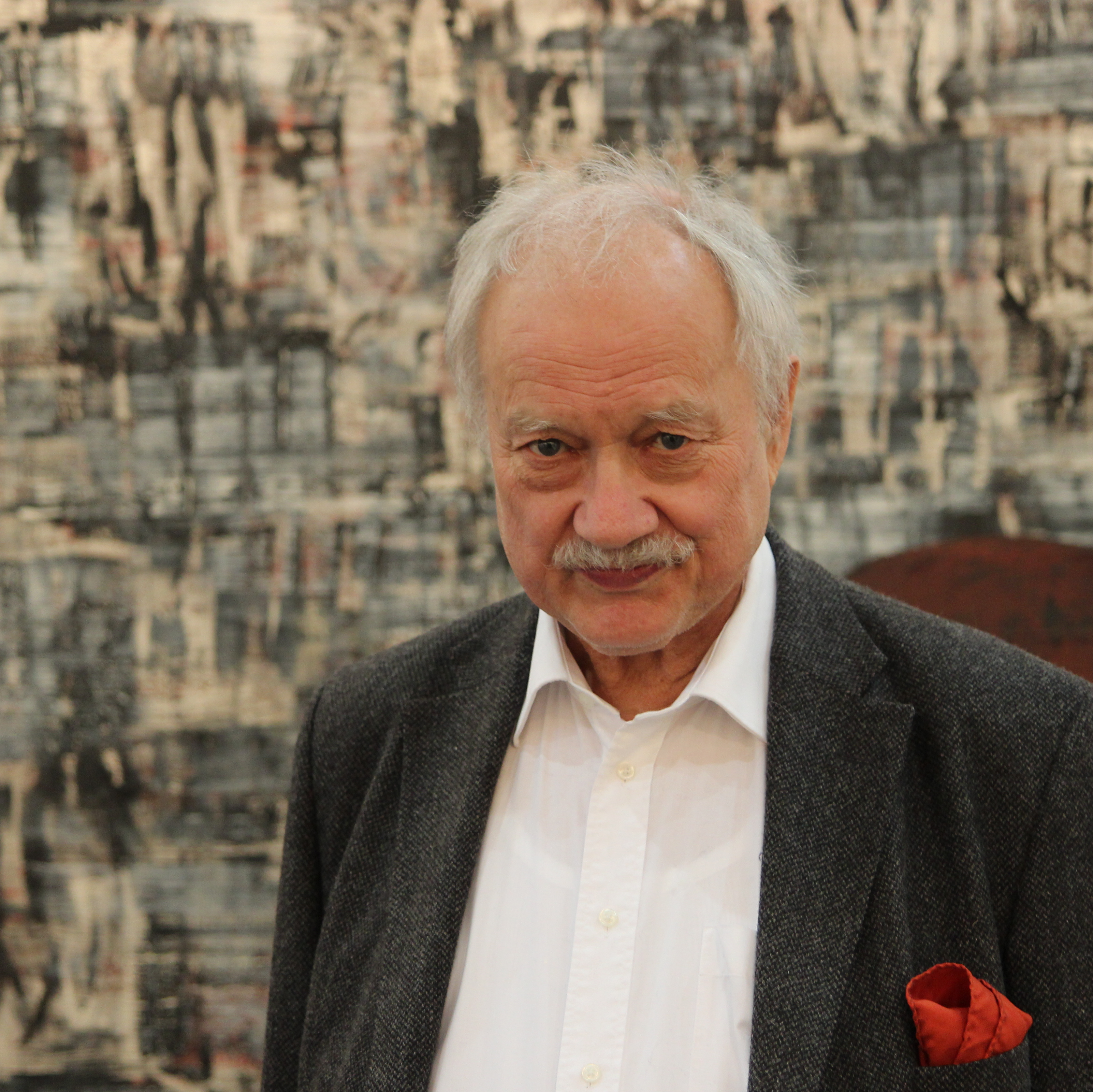 Der Galerist Georg Nothelfer bei der art Karlsruhe 2013